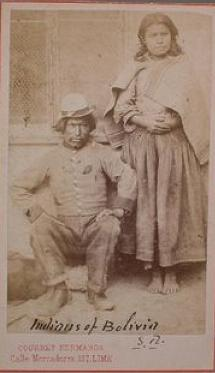 Soldado boliviano acompañado de rabona